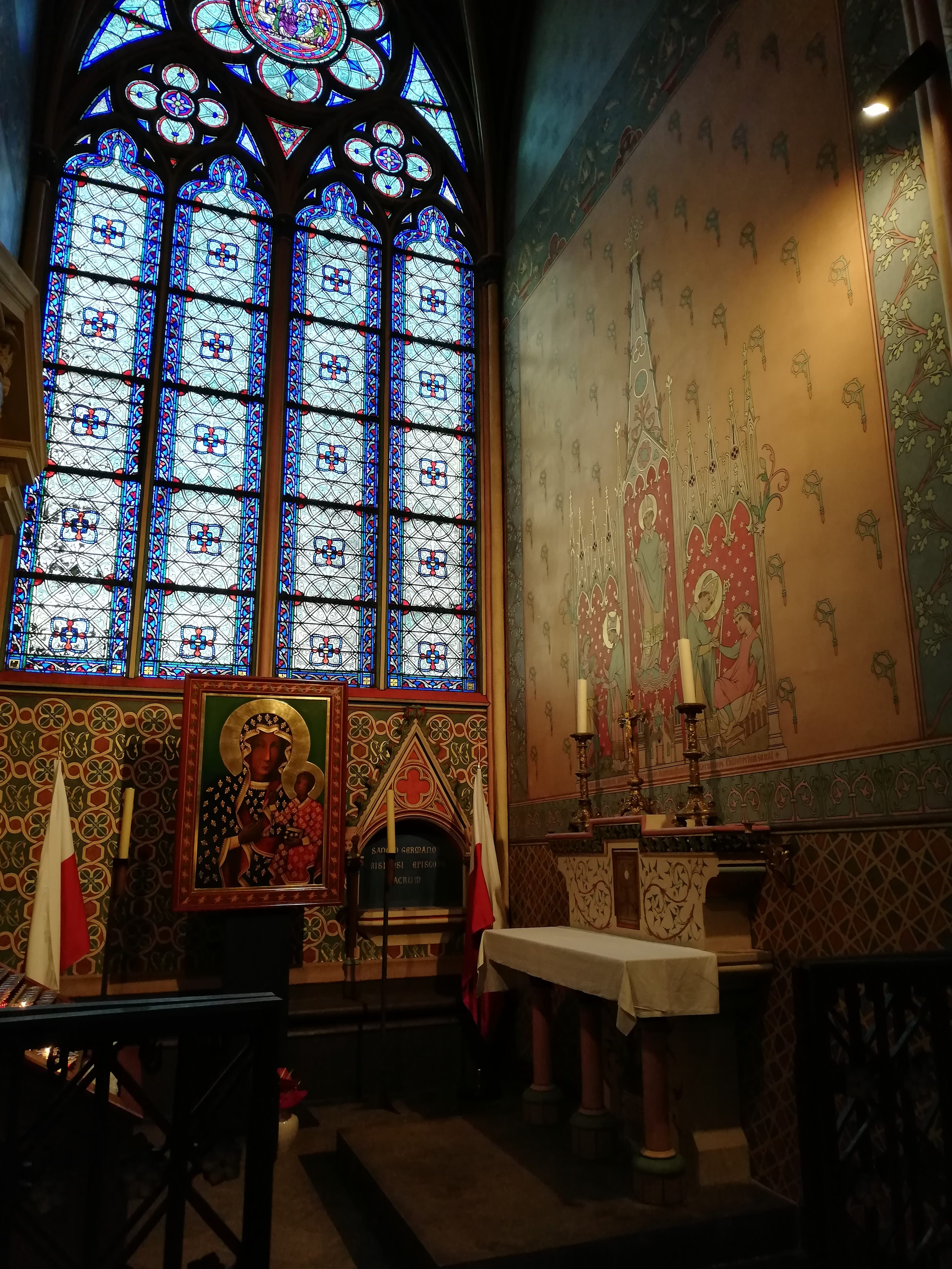 Noel 2018 à Notre Dame chapelle et vitrail